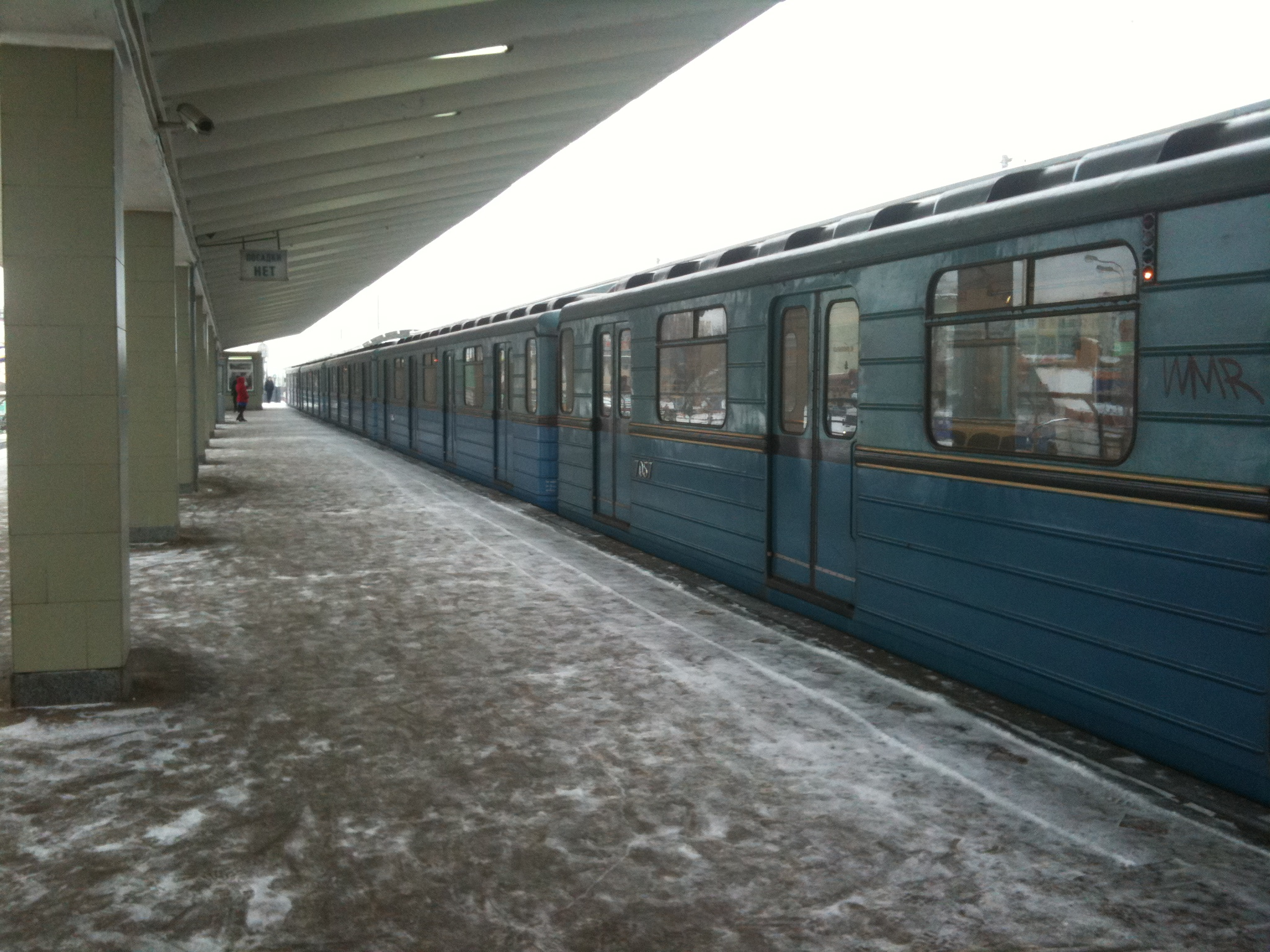 Vykhino (Выхино)